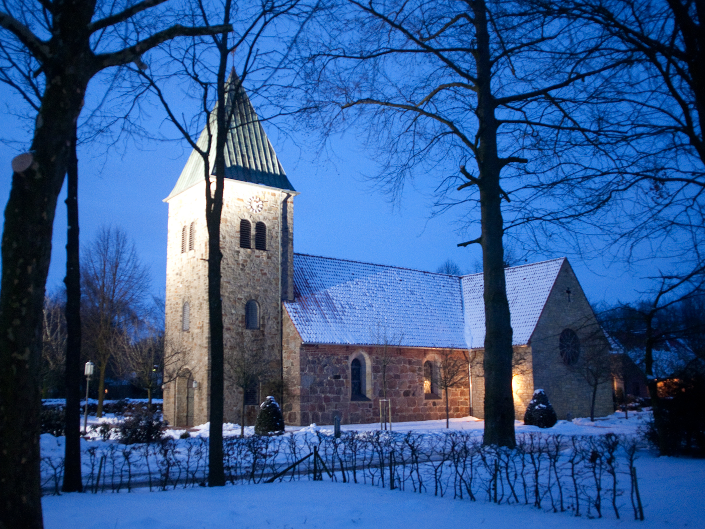 Sevelter Kirche